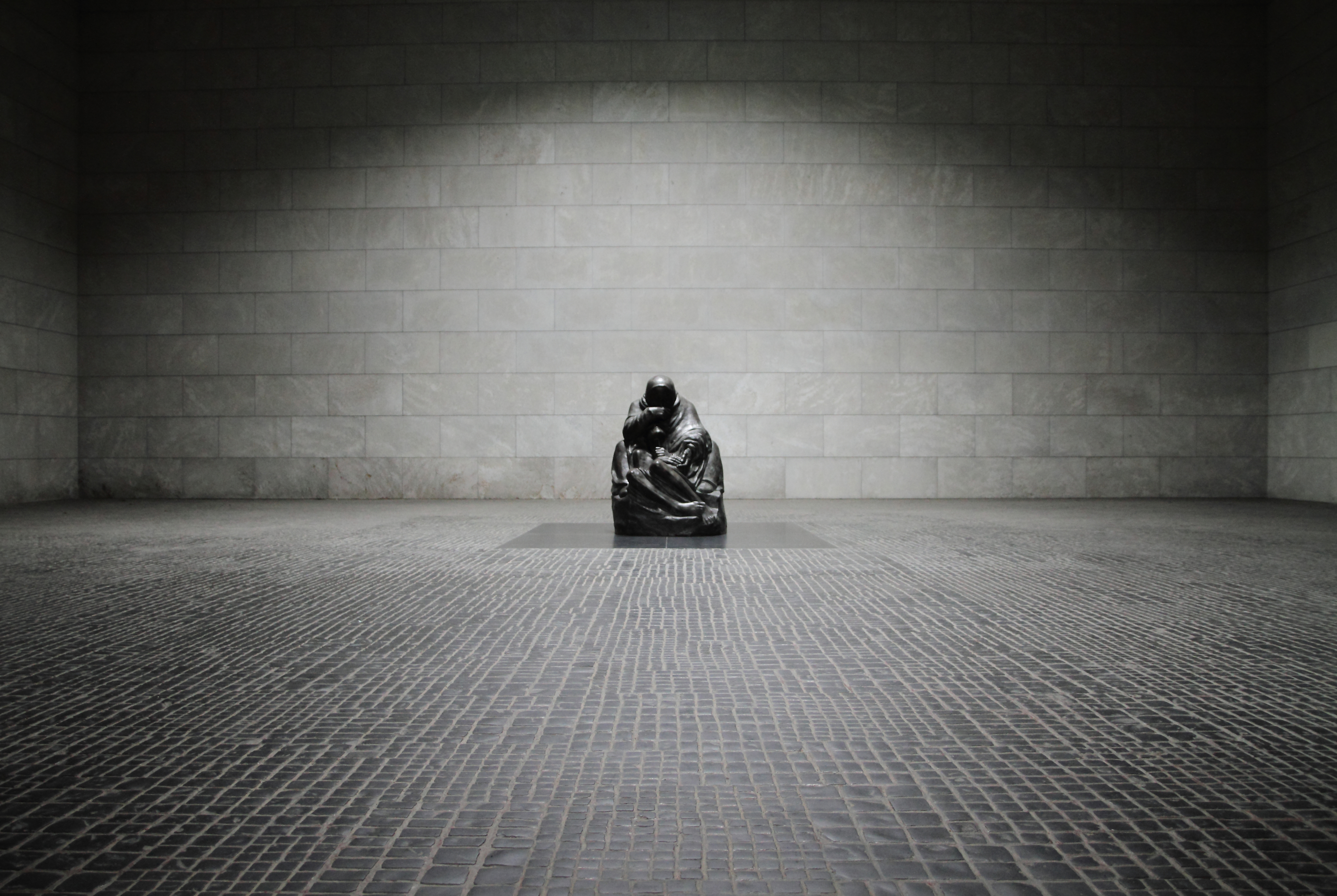 Fotografie von der Neuen Wache in Berlin